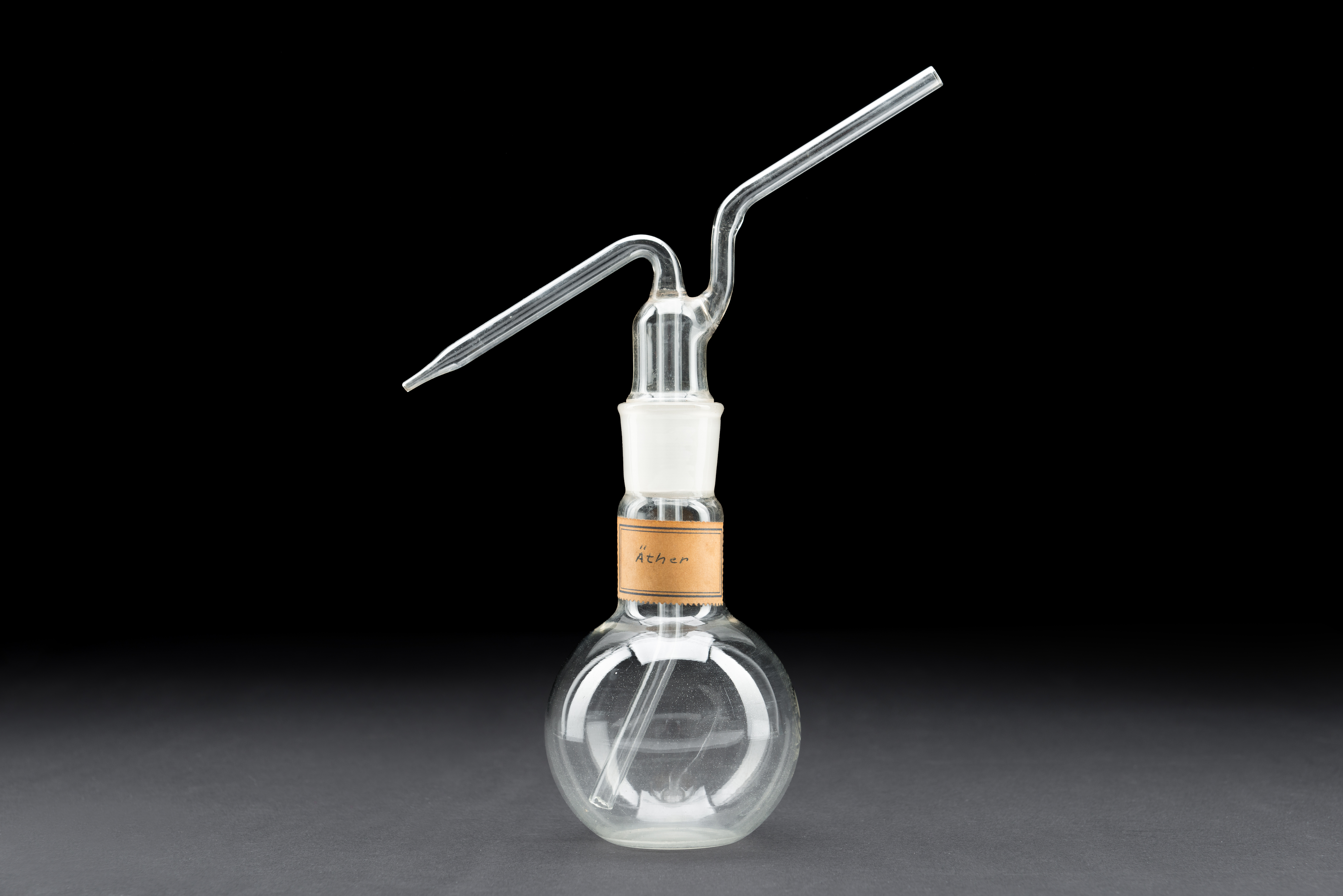 Glasspritzflasche für Äther, um 1900, Sammlung der Anorganischen Chemie der Universität Tübingen